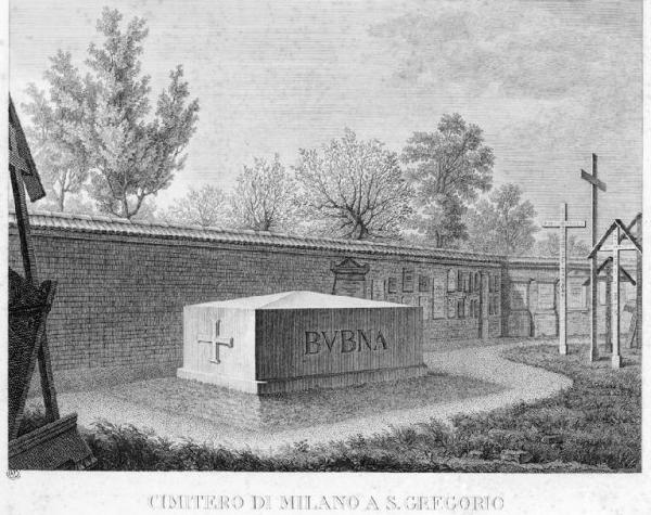 Monumento funebre del conte Ferdinando Bubna (1768-1825) presso il demolito cimitero di San Gregorio, Milano; the first tomb of count Ferdinand von Bubna und Littitz in Milan, San Gregorio cemetery (1825)